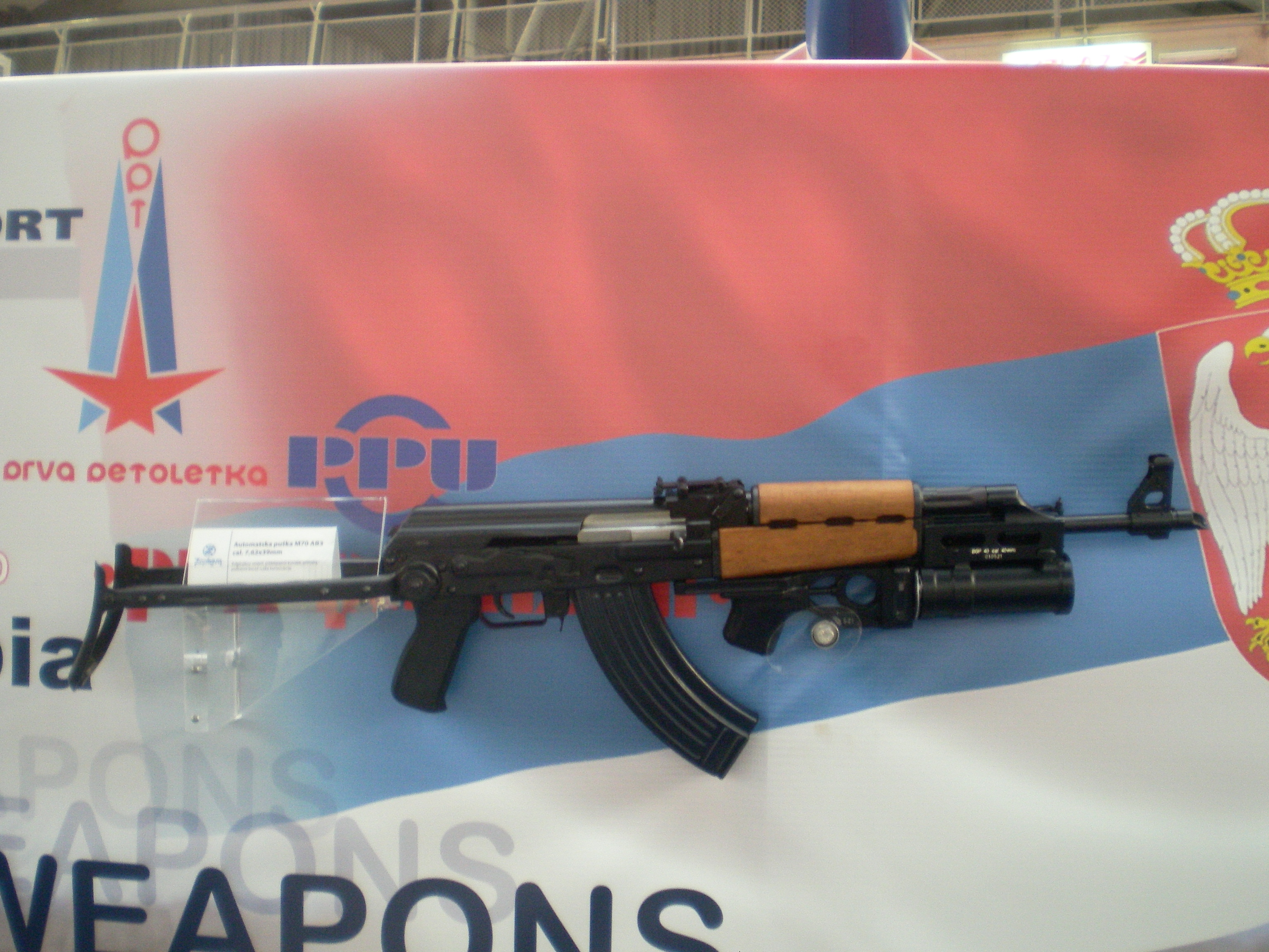 Zastava Arms M70-AB3